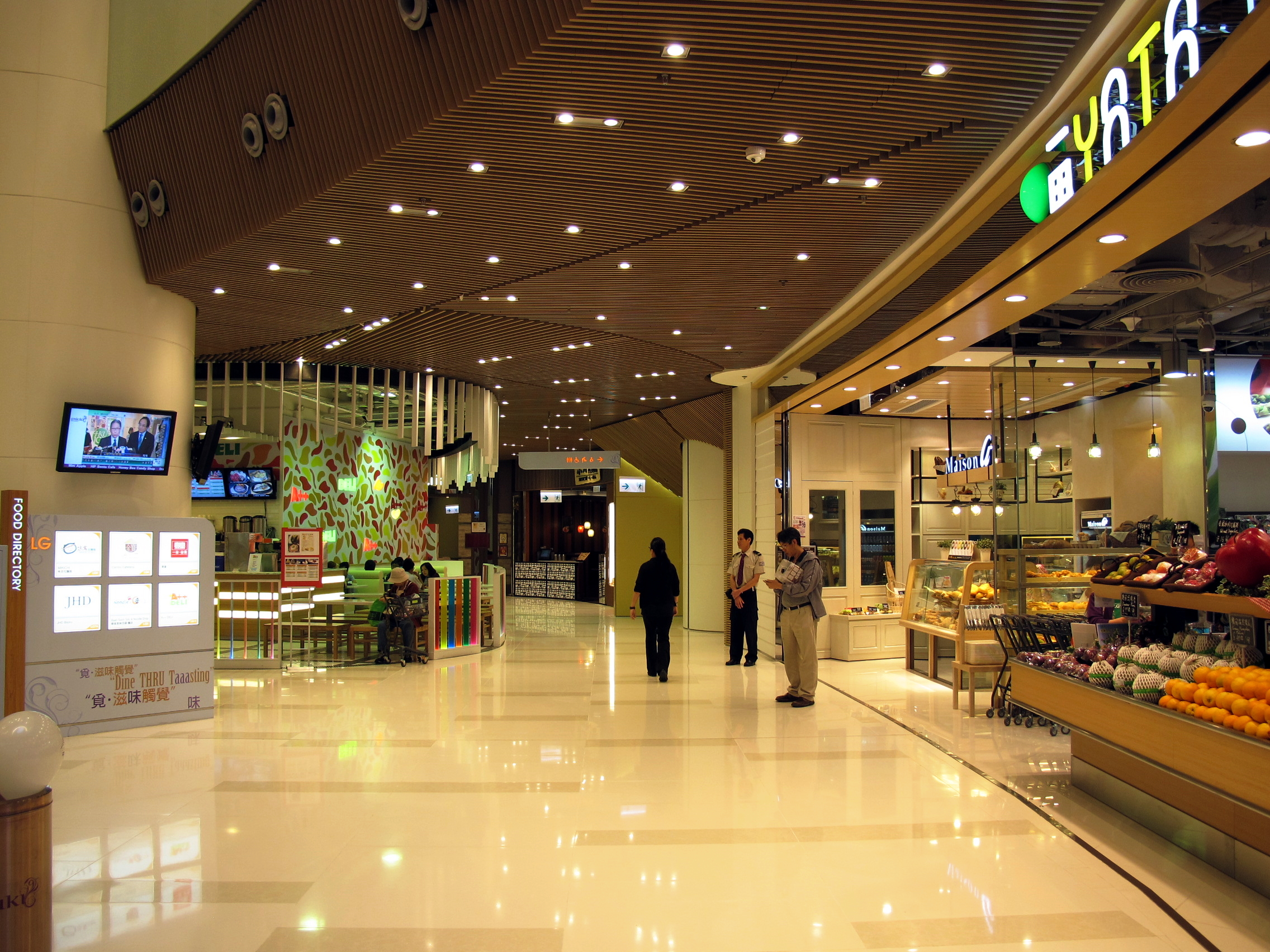 Mikiki Mall LG Levels Shops